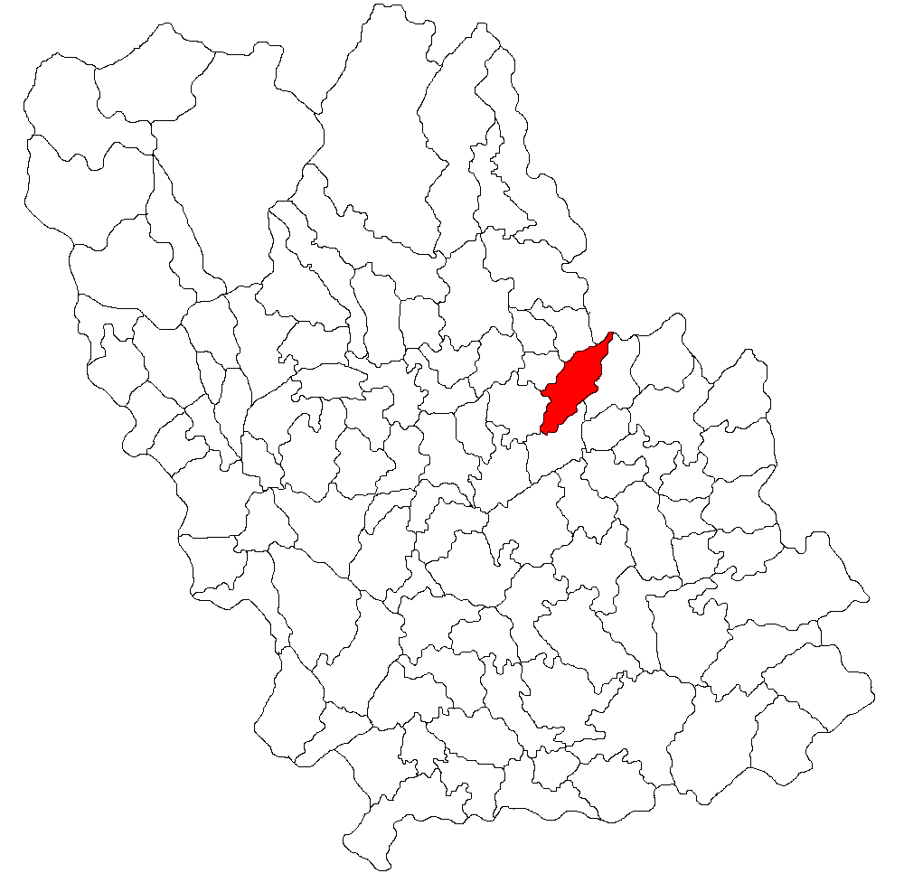 Categorie:Hărţi ale judeţului Prahova